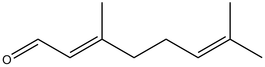 Geranial